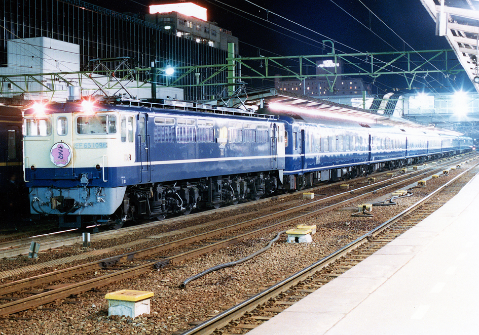 EF65 1096 けん引 寝台特急 さくら